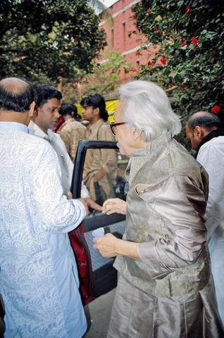 Shamsur Rahman at Pahela Falgun,1412